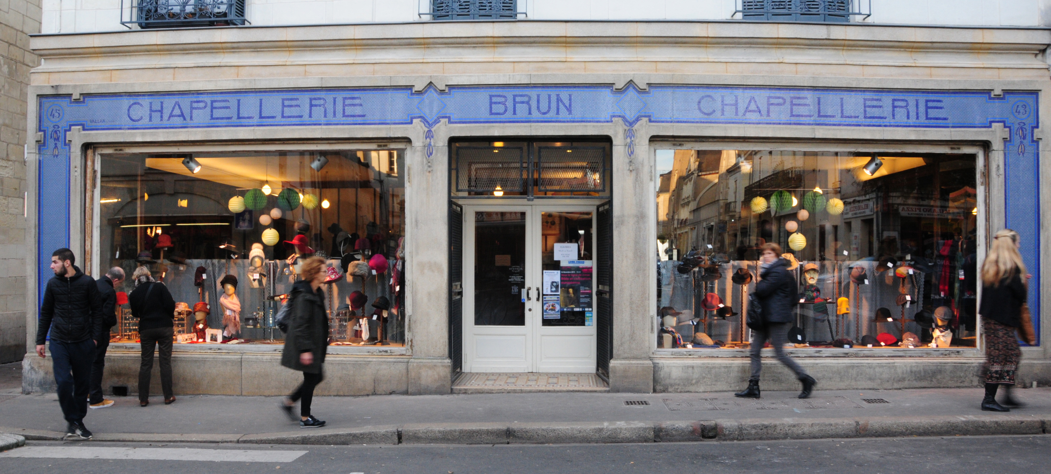 vue d'ensemble de la façade de la chapellerie Brun